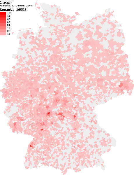 Verteilung des Nachnamens Sauer in Deutschland nach dem Telefonbuch mit Stand vom 6. Januar 2005